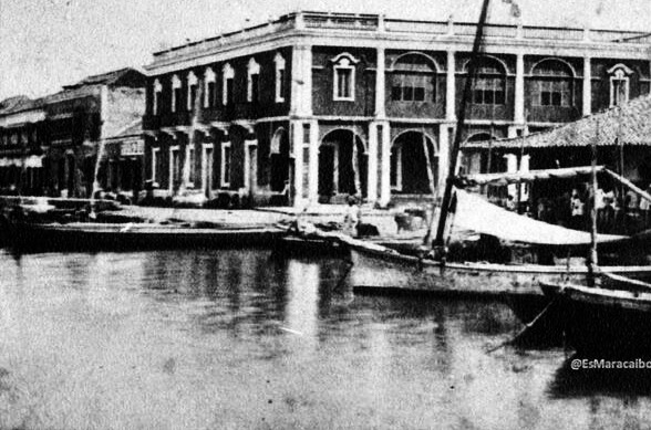 Piraguas sobre el lago de Maracaibo, en el malecón de la ciudad.